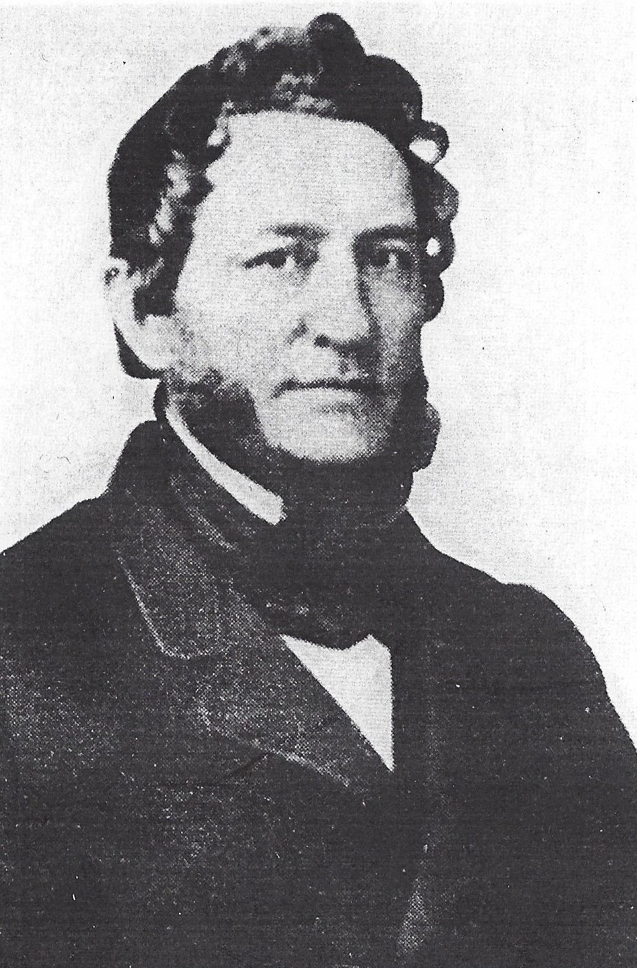 Porträtfotografie von Ernst Friedrich Adickes (1811-1878)